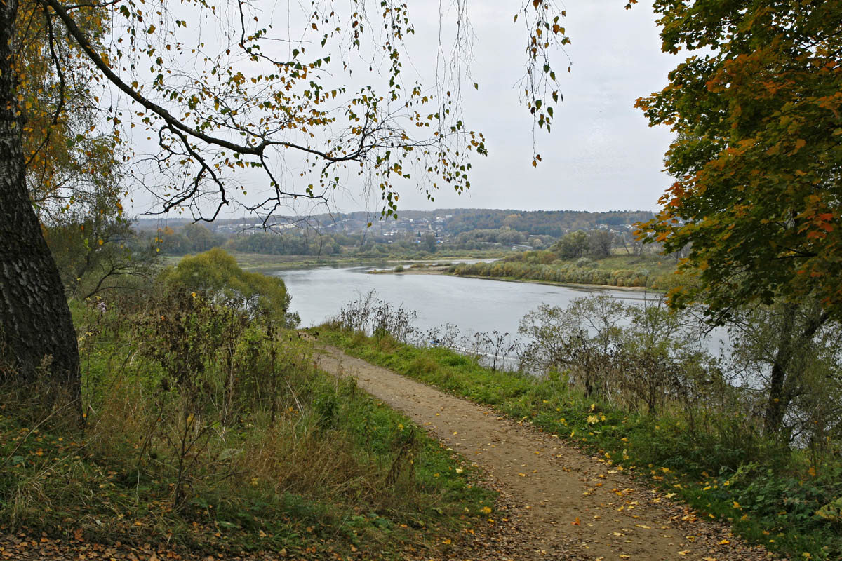 Oka